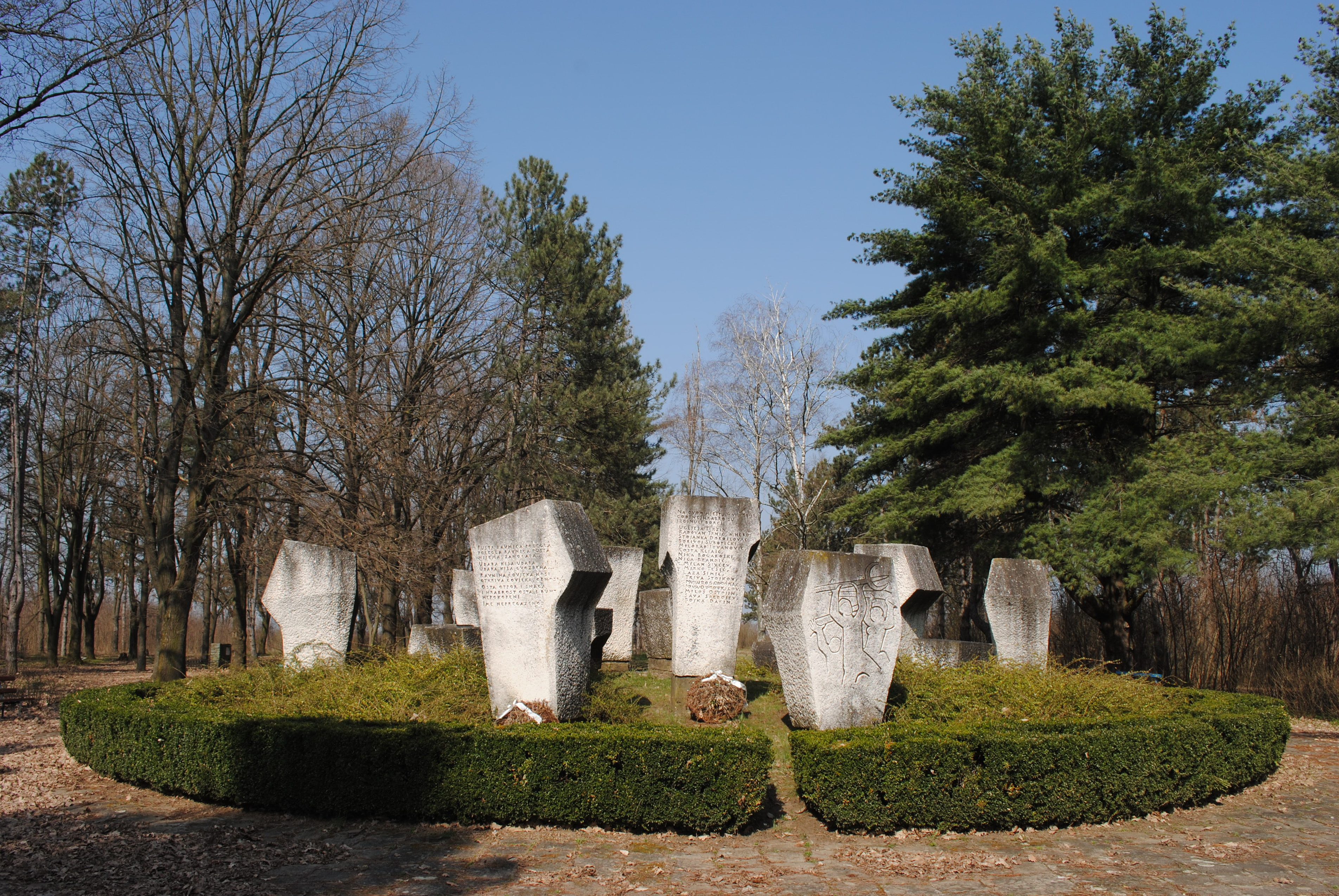 Srpski (latinica): Spomenik palim borcima kikindskog odreda NOB-a. Autor spomenika Rudolf Matutinović